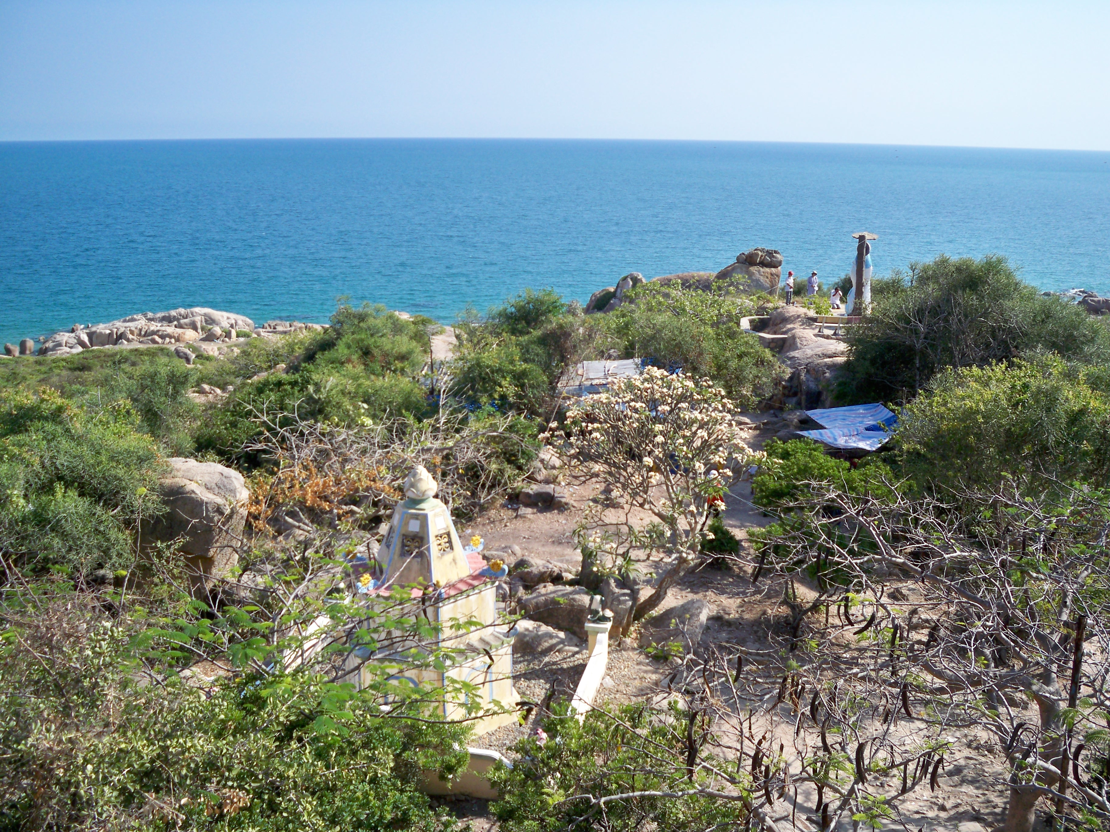 Tác phẩm do Phan Minh Châu chụp tại Cổ Thạch Tự - Bình Thuận nhân chuyến đi tham quan cùng học sinh trường THCS Thủ Thừa - Long An